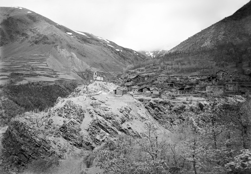 Imatge